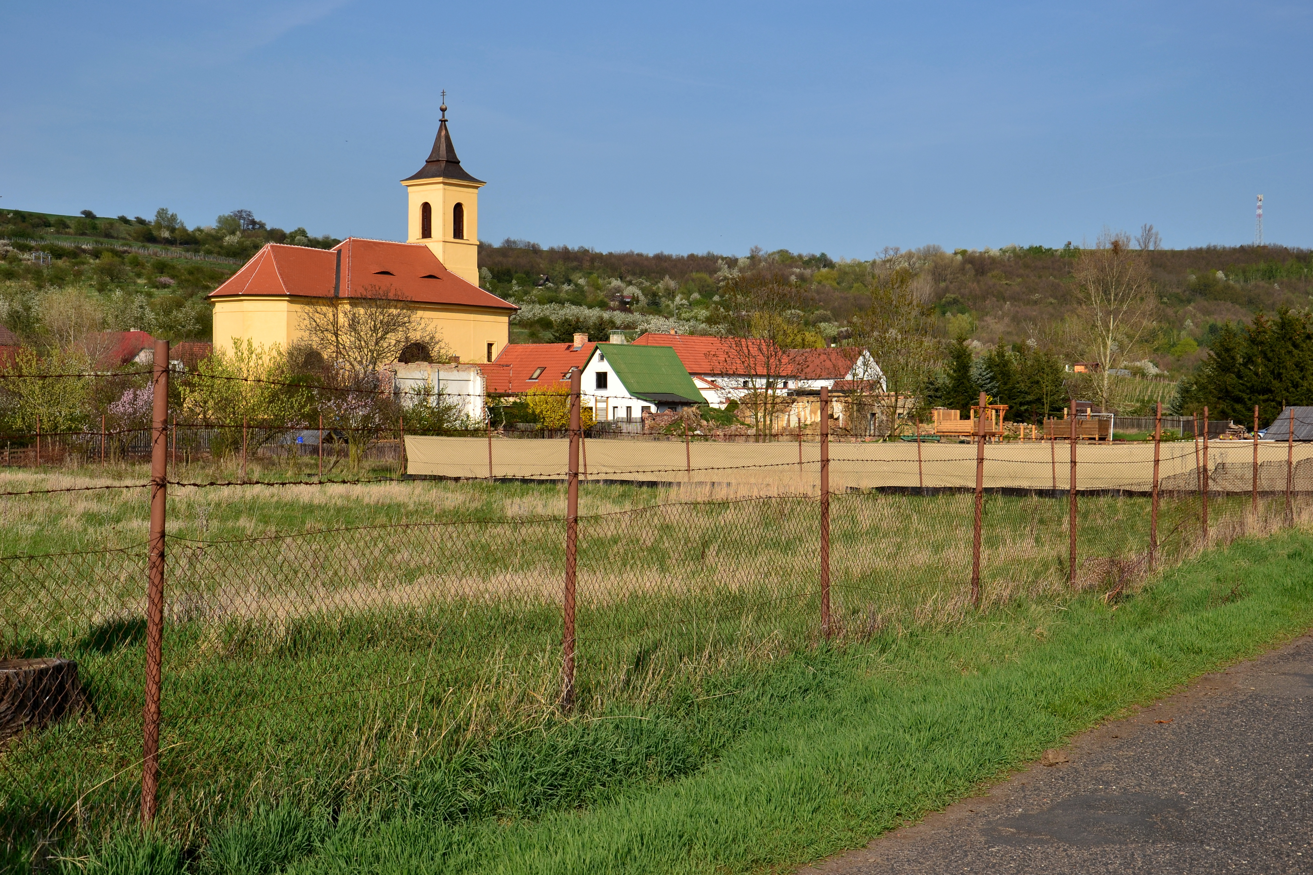 Stranná – západní okraj vesnice s kostelem Nejsvětější Trojice